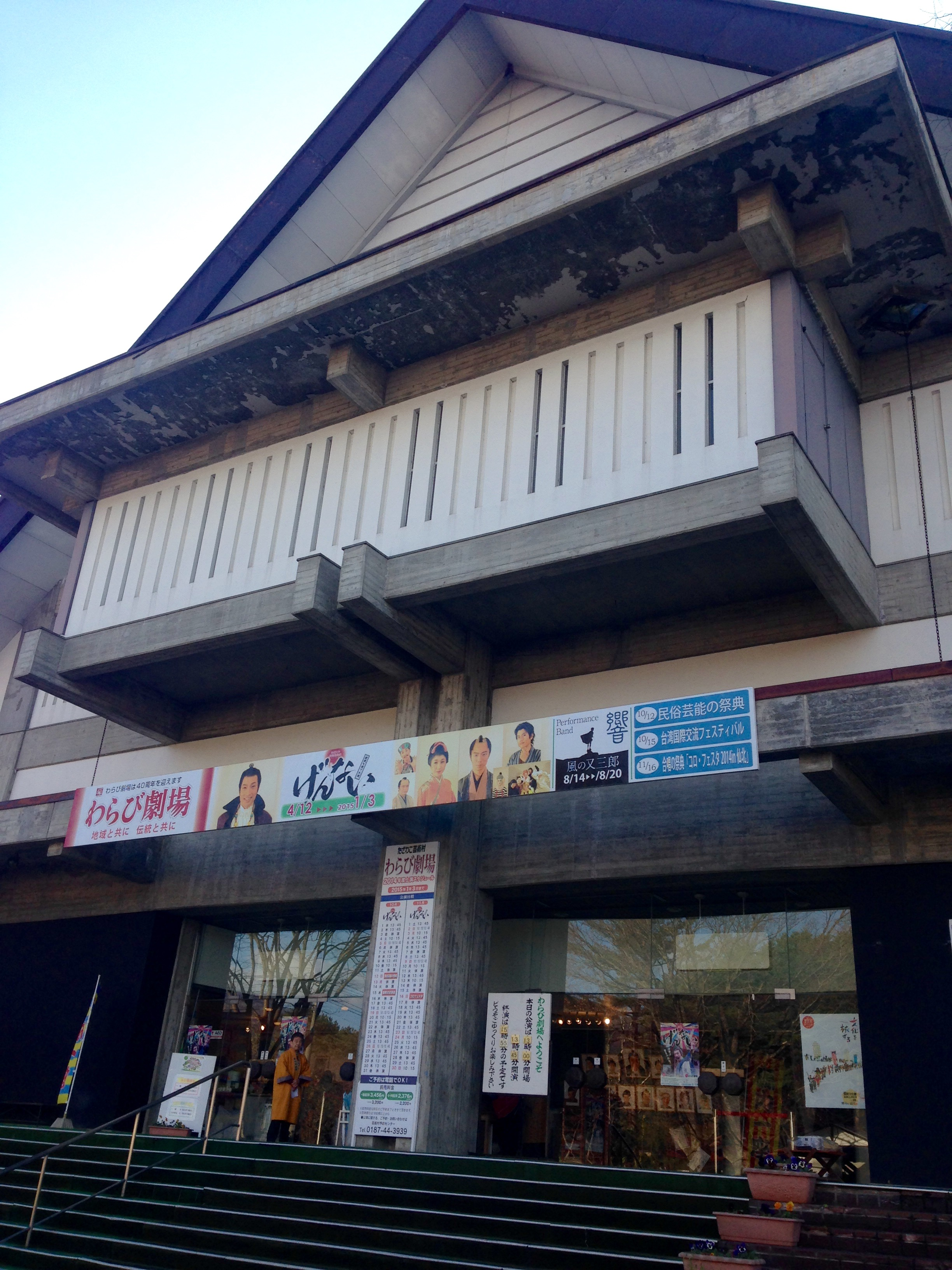 わらび劇場外観